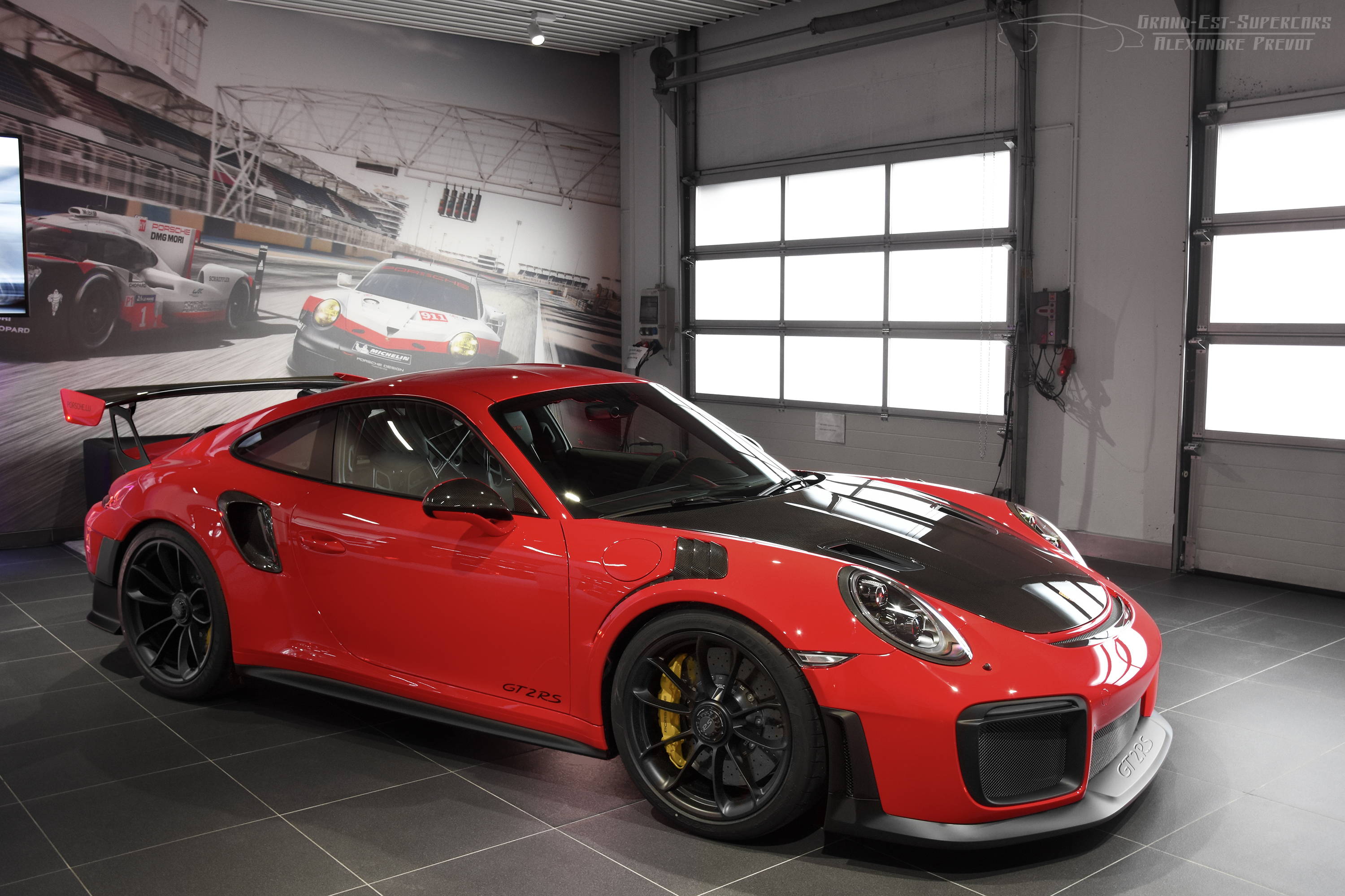 Couleur : Rouge Indien